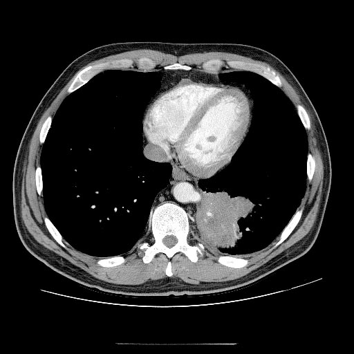 chest CT: diagnosis is pulmonary sequestration